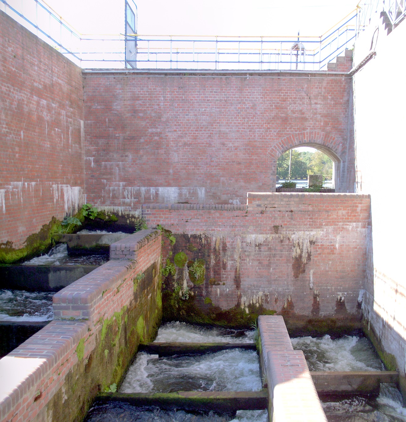 zespół Kanału Bydgoskiego (Starego i Nowego), 1773-1774, 1908-1815: szlak wodny z urządzeniami hydrotechnicznymi (9 śluz, 1 jaz) 6 budynków maszynowni 2 budynki sterowni 3 budynki obsługi 5 budynków mieszkalnych („dom śluzowego”) Bydgoszcz - Kanał Bydgoski (zabytek nr rejestr. A/900/1-27)